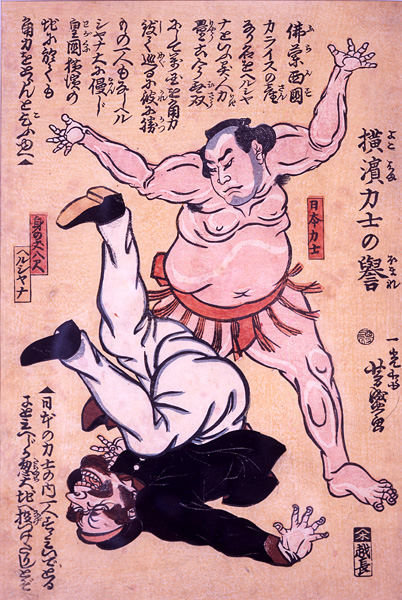 Победа японского силача над американским военным в соревнованиях в Йокогаме. Призвана продемонстрировать преимущество японцев над «варварами».